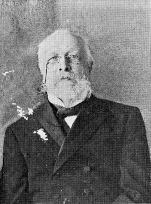 Евгений Густавович Вейденбаум